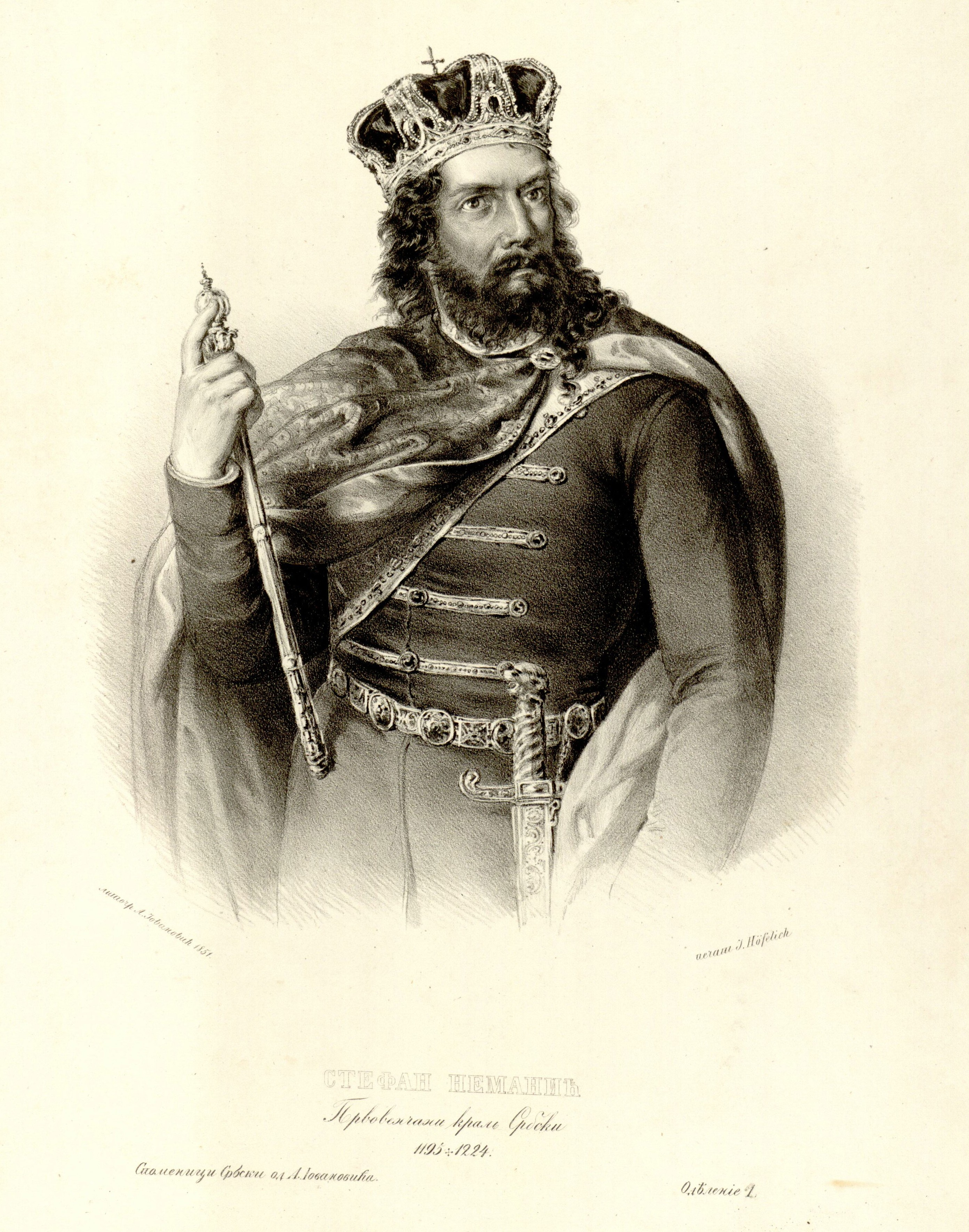 Lithograph of king Stefan Prvovenčani by Anastas Jovanović. Caption: литогр. А. Іовановић 1851.печат I. Höfelich СТЕФАН НЕМАНИЋ Первовенчани краль Србски 1195+1224 Споменици Србски од А. Іовановића.Одѣленіе 2.